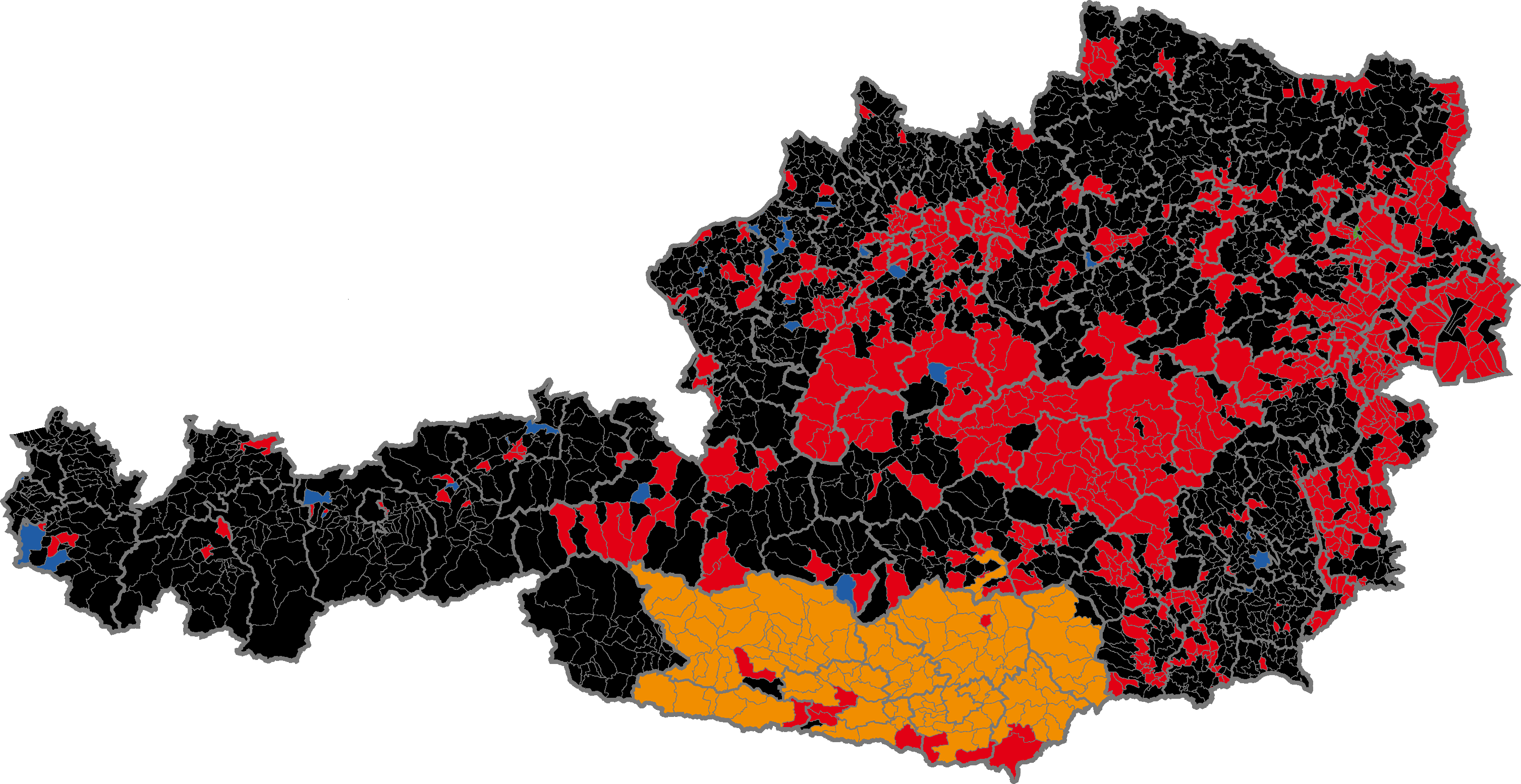 Austrian legislative election 2008 result by municipality Sozialdemokratische Partei Österreichs Österreichische Volkspartei Bündnis Zukunft Österreich Freiheitliche Partei Österreichs Die Grünen